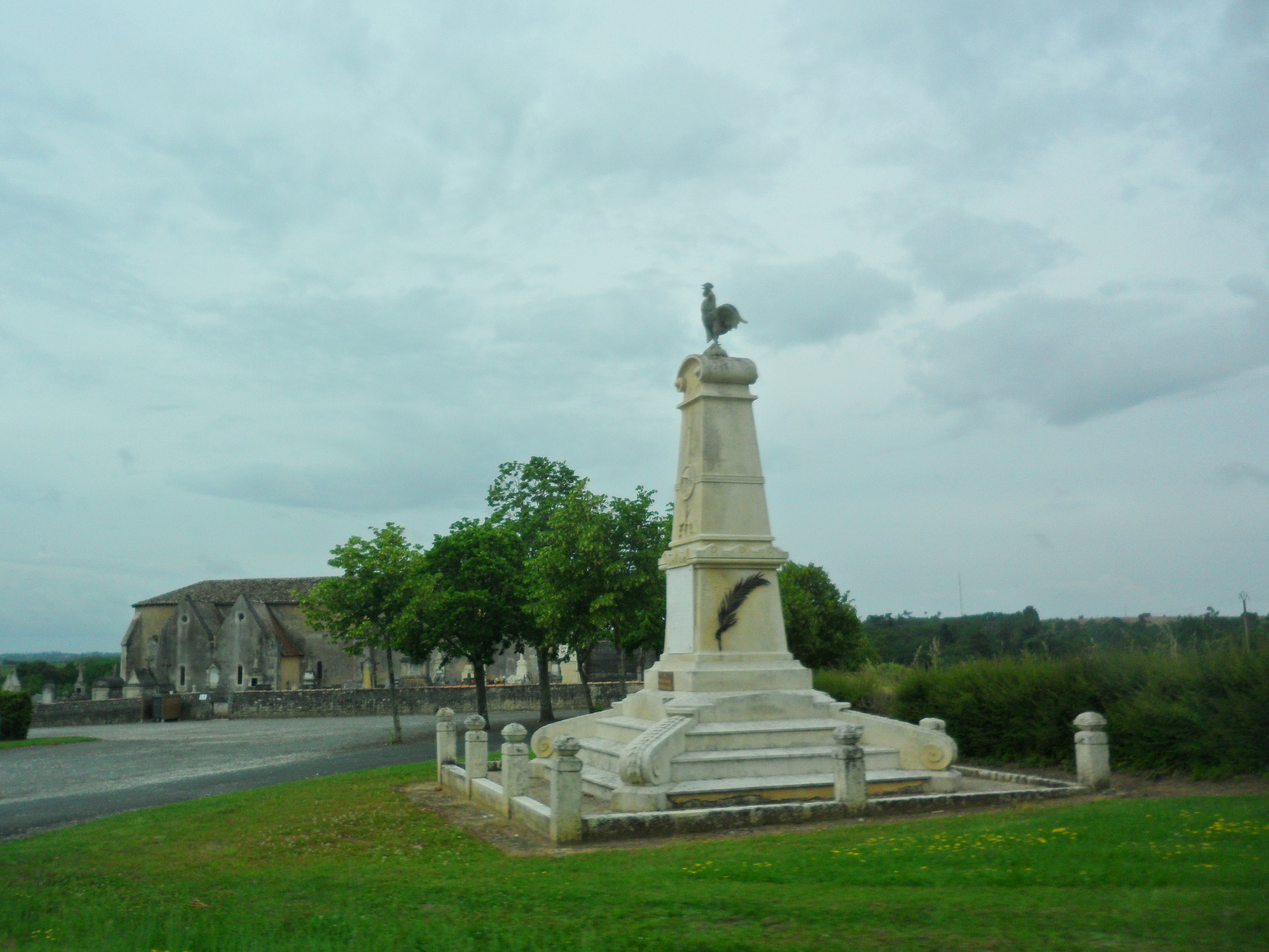 Monument au mort et église de Courpignac